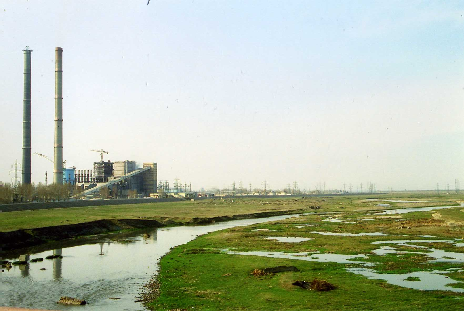 Bacău Industry